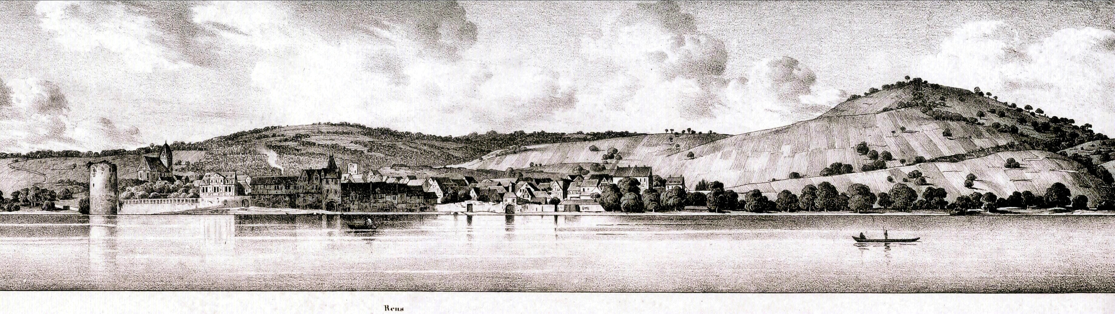 Rhens 1833, aus "F. C. Vogels Panorama des Rheins oder Ansichten des rechten und linken Rheinufers von Mainz bis Coblenz, gezeichnet von Jakob Becker